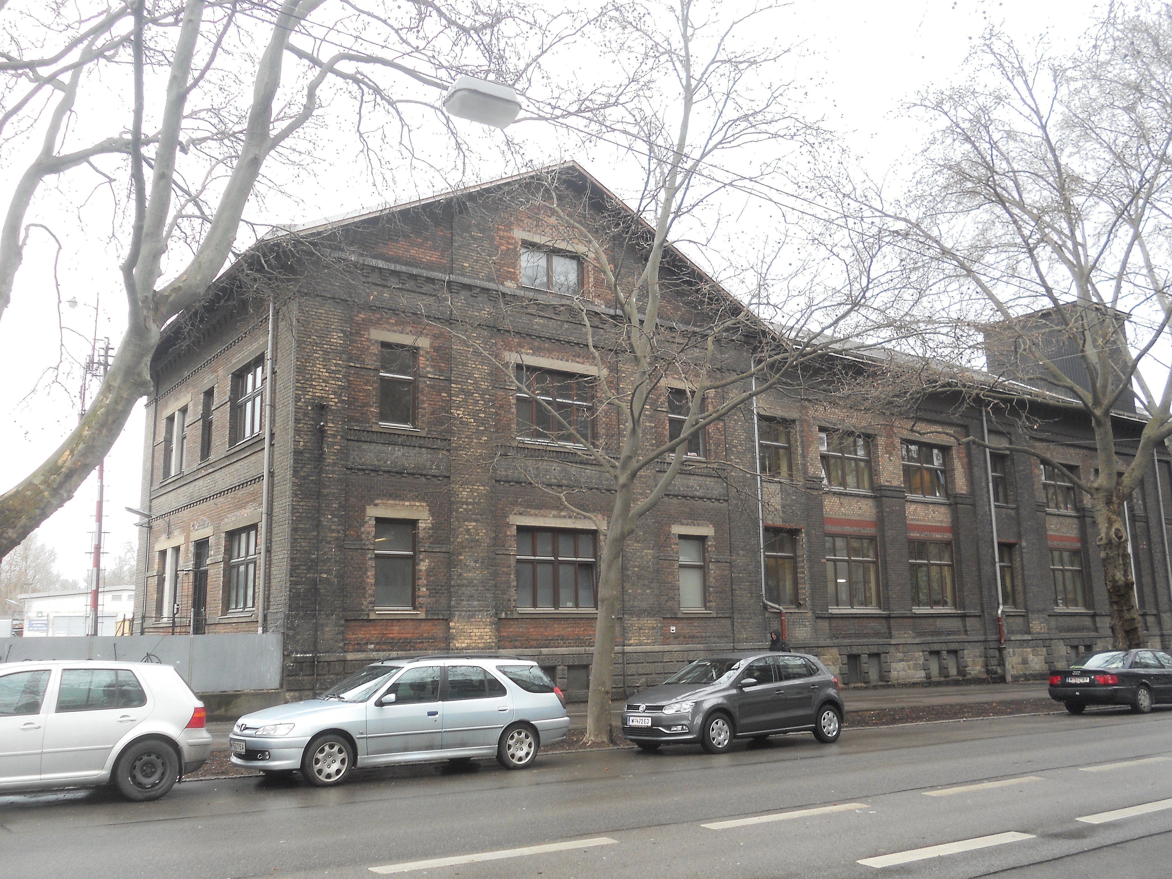 Haus Innstraße 20, ein Relikt des Frachtenbahnhofs Nordbahnhof